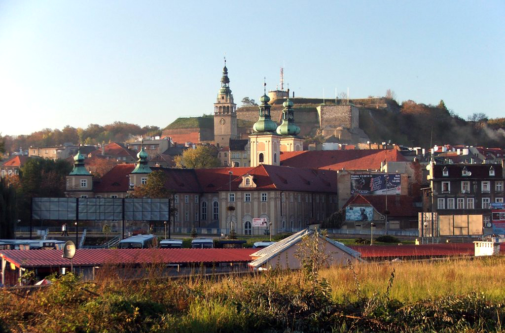 Kłodzko – widok na miasto z dworca PKP (woj. dolnośląskie)